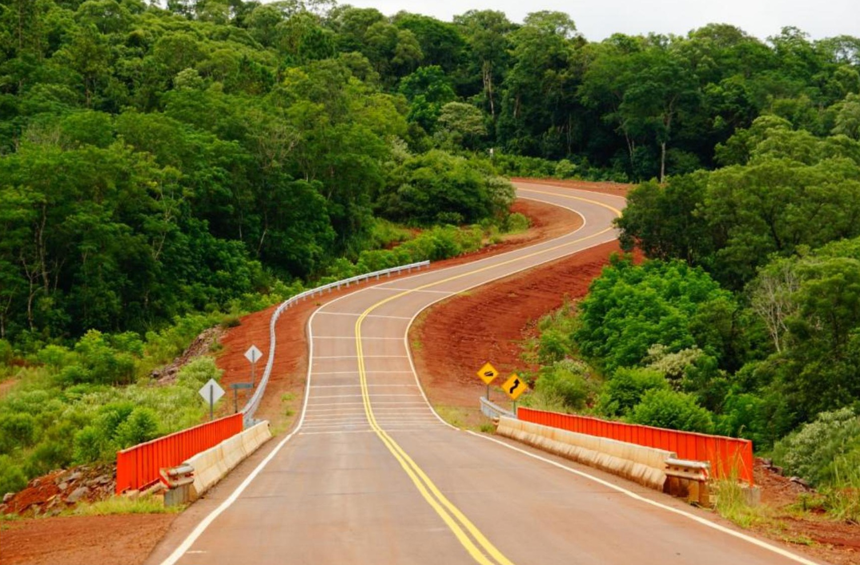 La Ruta Provincial 27 en la provincia de Misiones, Argentina.